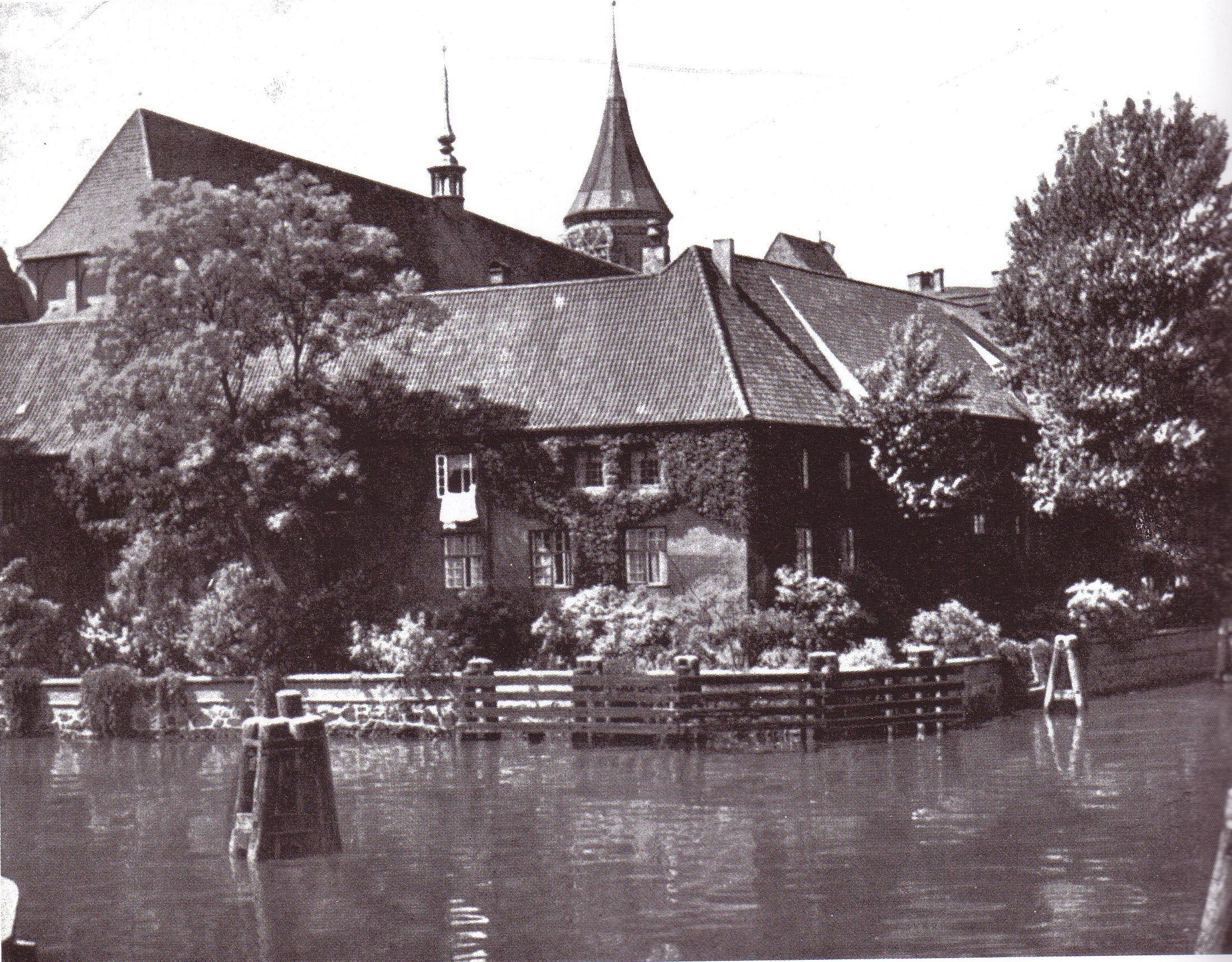 Fotografie des Collegium Albertinum an der Nordostseite des Königsberger Doms auf der Dominsel am neuen Pregel.